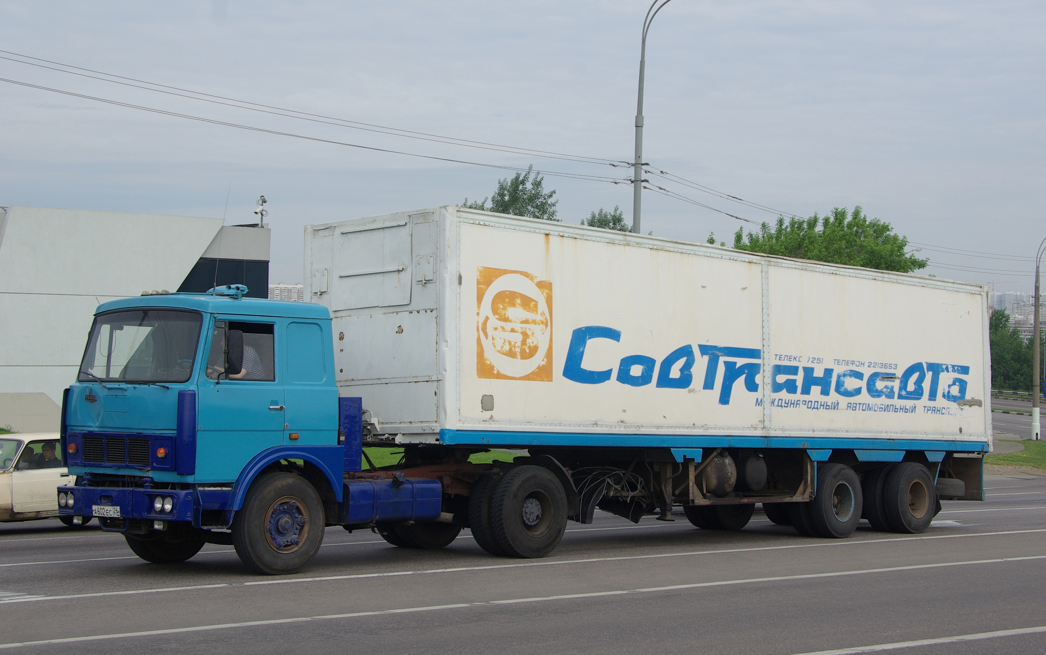 MAZ truck and Sovtransavto trailer, like in 80-s